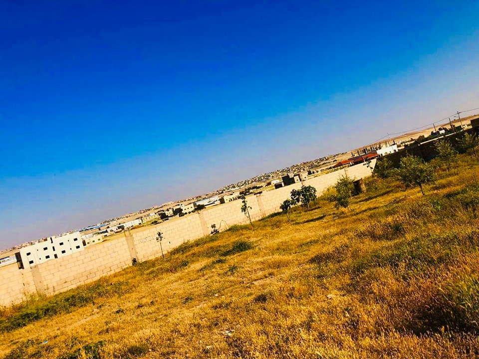 صورة لأحد الأراضي الزراعية في منطقة رجم الشامي الاردنية في الفترة الصباحية